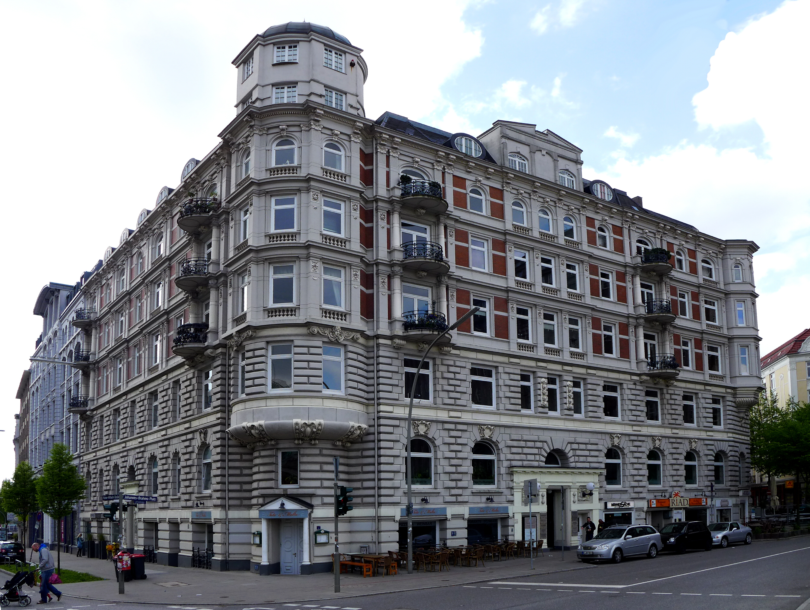 Hamburg-Neustadt, Kaiser-Wilhelm-Straße Ecke Poolstraße. Eckhaus erbaut im Stil der Gründerzeit zu Ende des 19. Jahrhunderts. Dieses Gebäude hat die Bombardierung Hamburgs im Weltkrieg II (Operation Gomorrha) weitgehend unbeschadet überstanden.